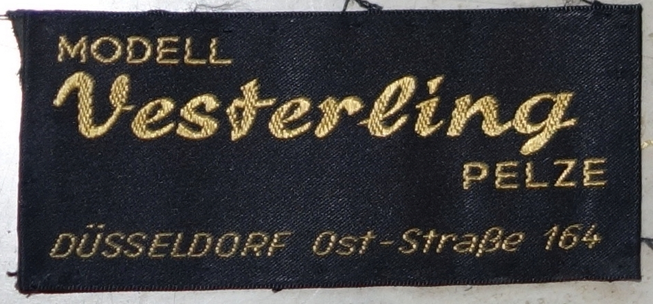 Einnähetikett Modellpelze Vesterling, Düsseldorf.